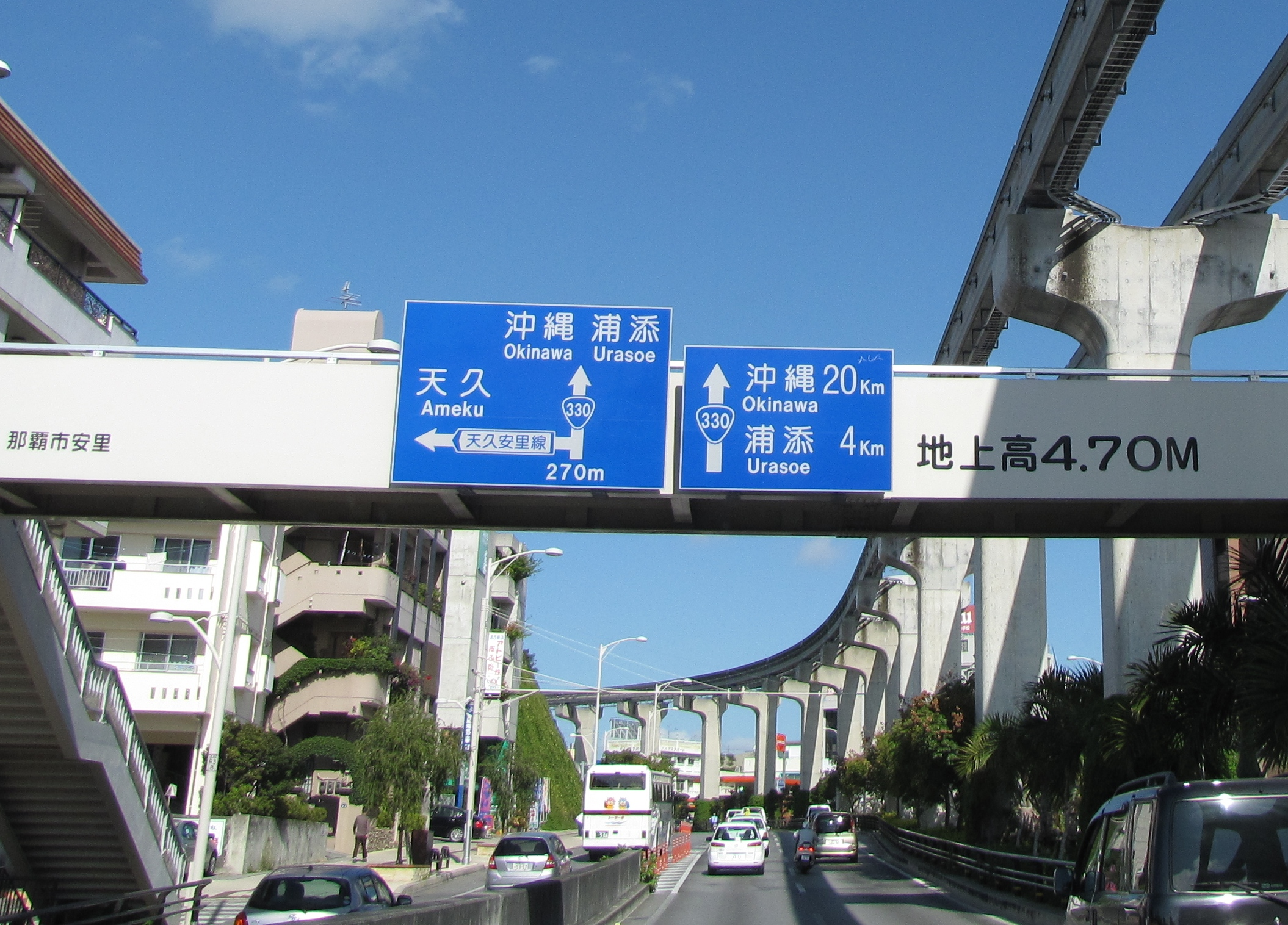 国道330号（那覇市内）